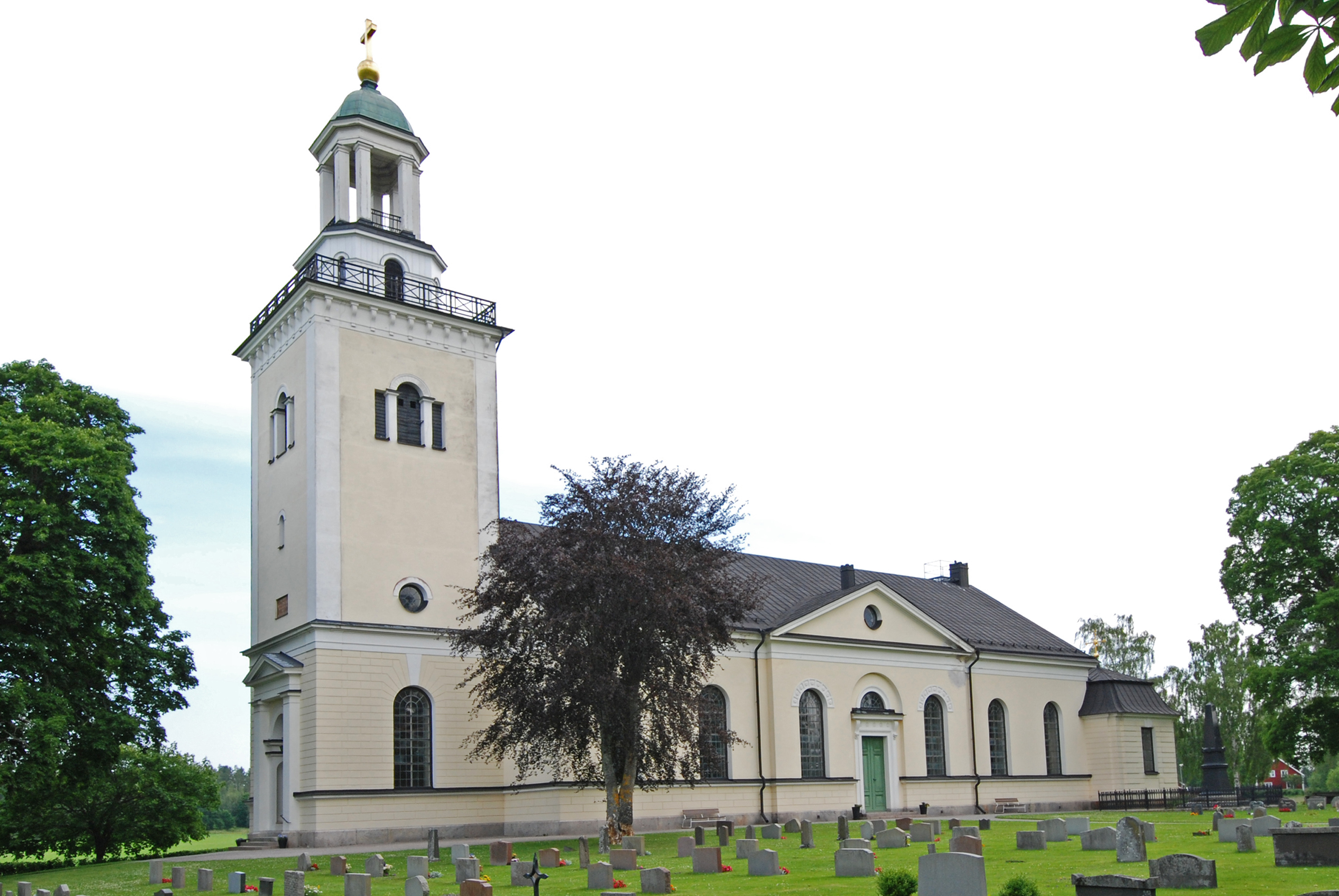 Öja kyrka, Södermanland